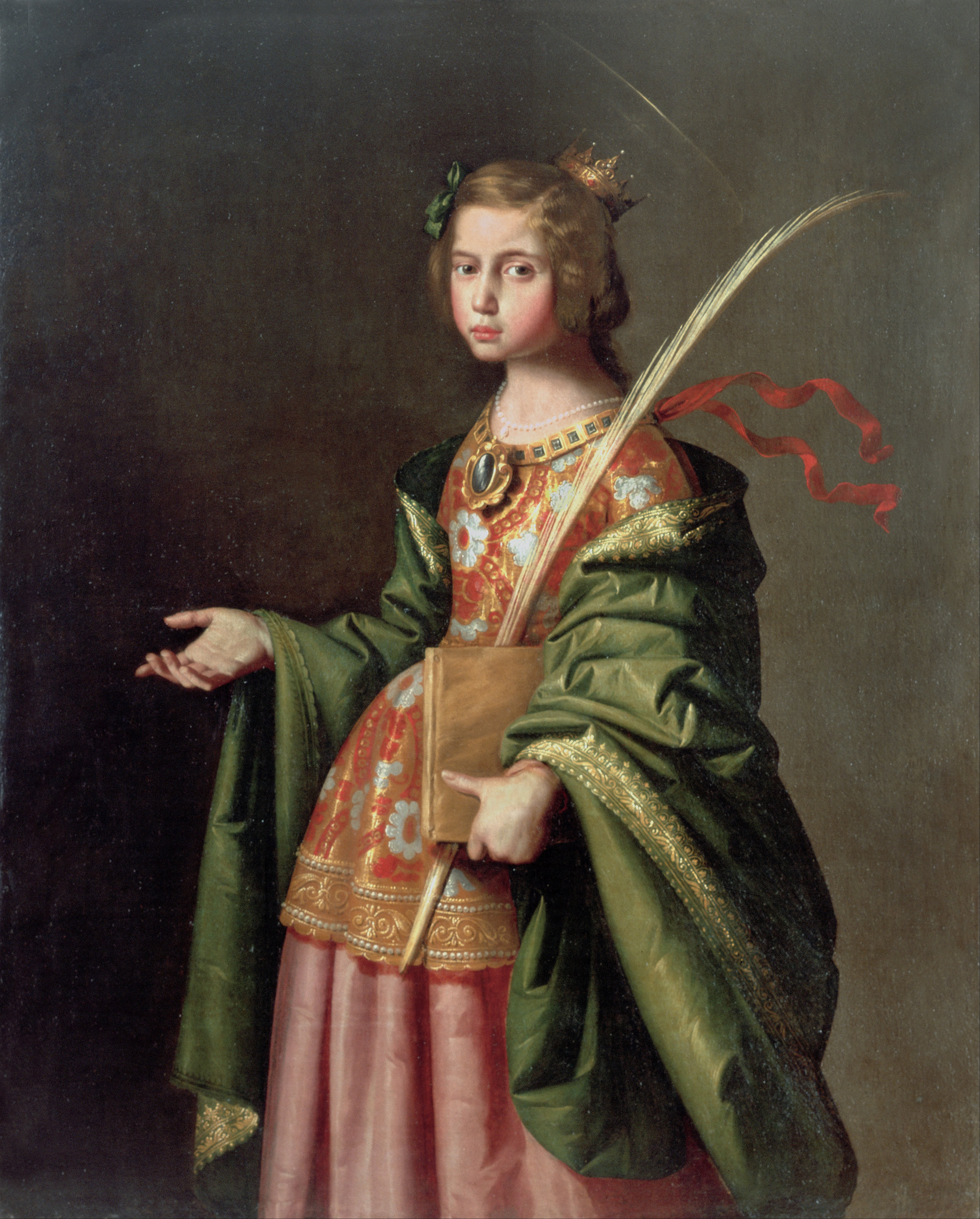 El lienzo representa a Santa Isabel de Turingia (1207-1231), más conocida como Santa Isabel de Hungría.